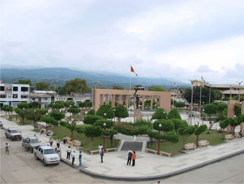 fotografia de la Plaza de Armas de la Ciudad de Bagua Grande Utcubamba